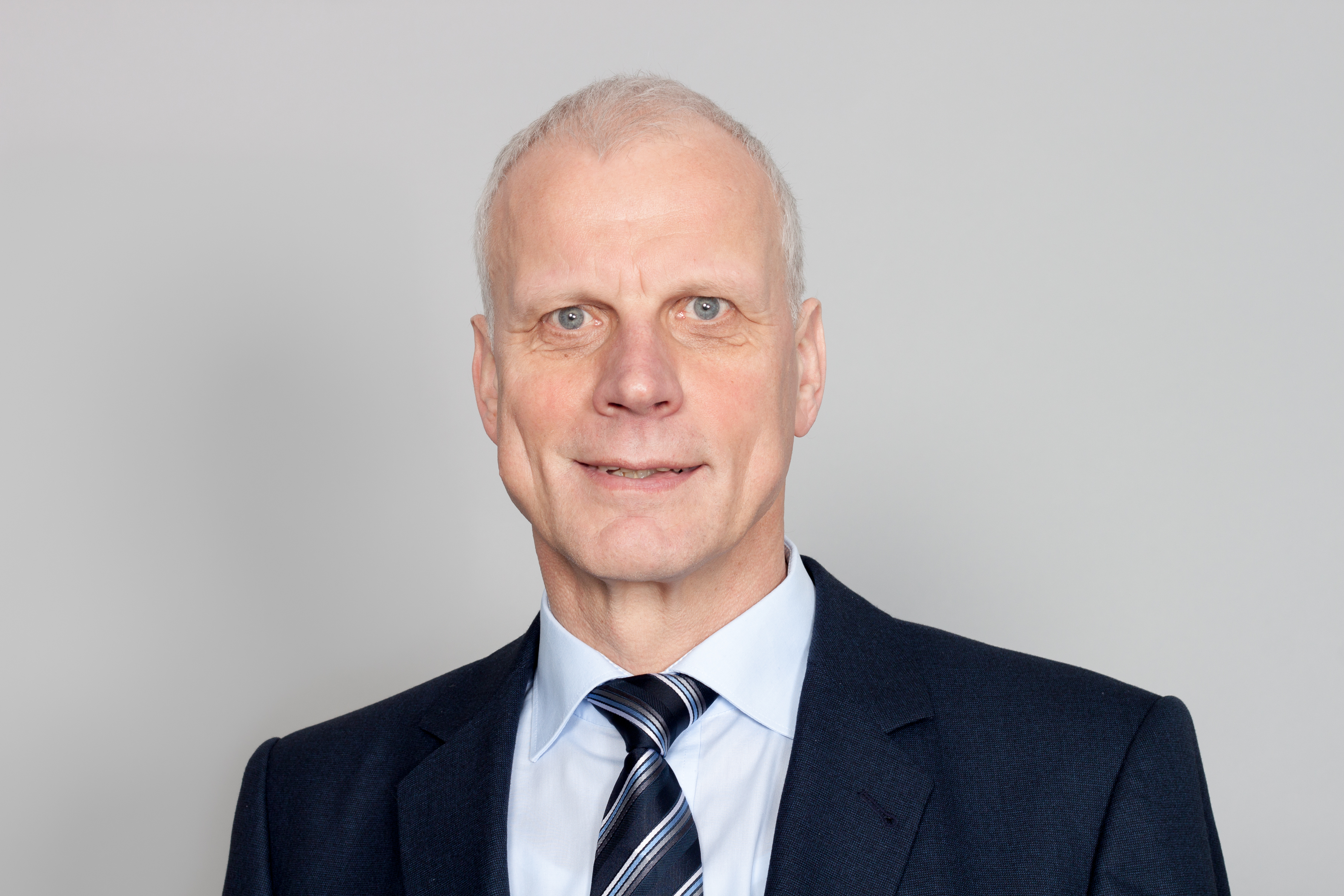 Abgeordneter des Sächsischen Landtages Wolf-Dietrich Rost